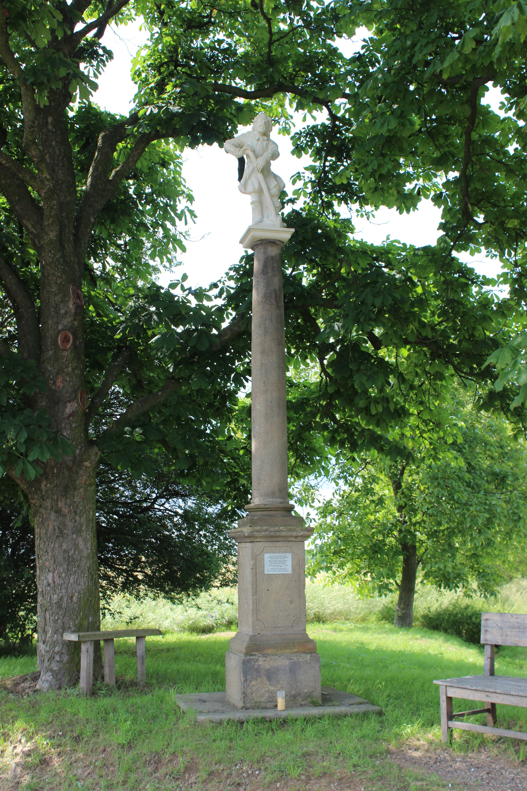 Sloup se sochou svatého Isidora severozápadně od Skřivaně.